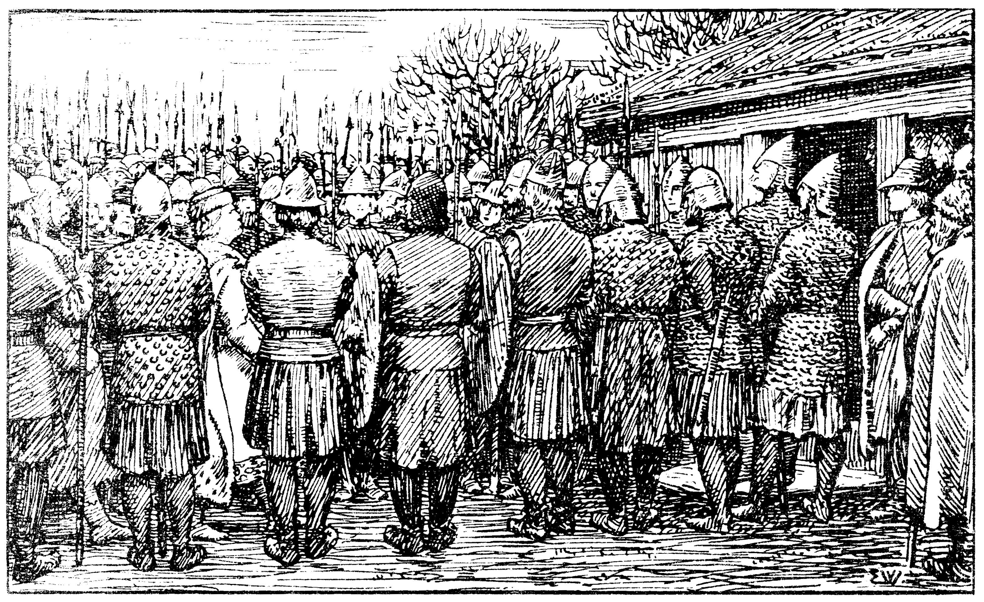 Erik Werenskiold: Illustration for Olav den heilages saga, Heimskringla 1899-edition. nn: «Kong Olav går imellom mannradene fram til Erling Skjalgsson.»